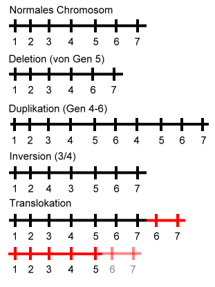 Arten der Chromosomenmutation - GNU-FDL - selbst erstellt